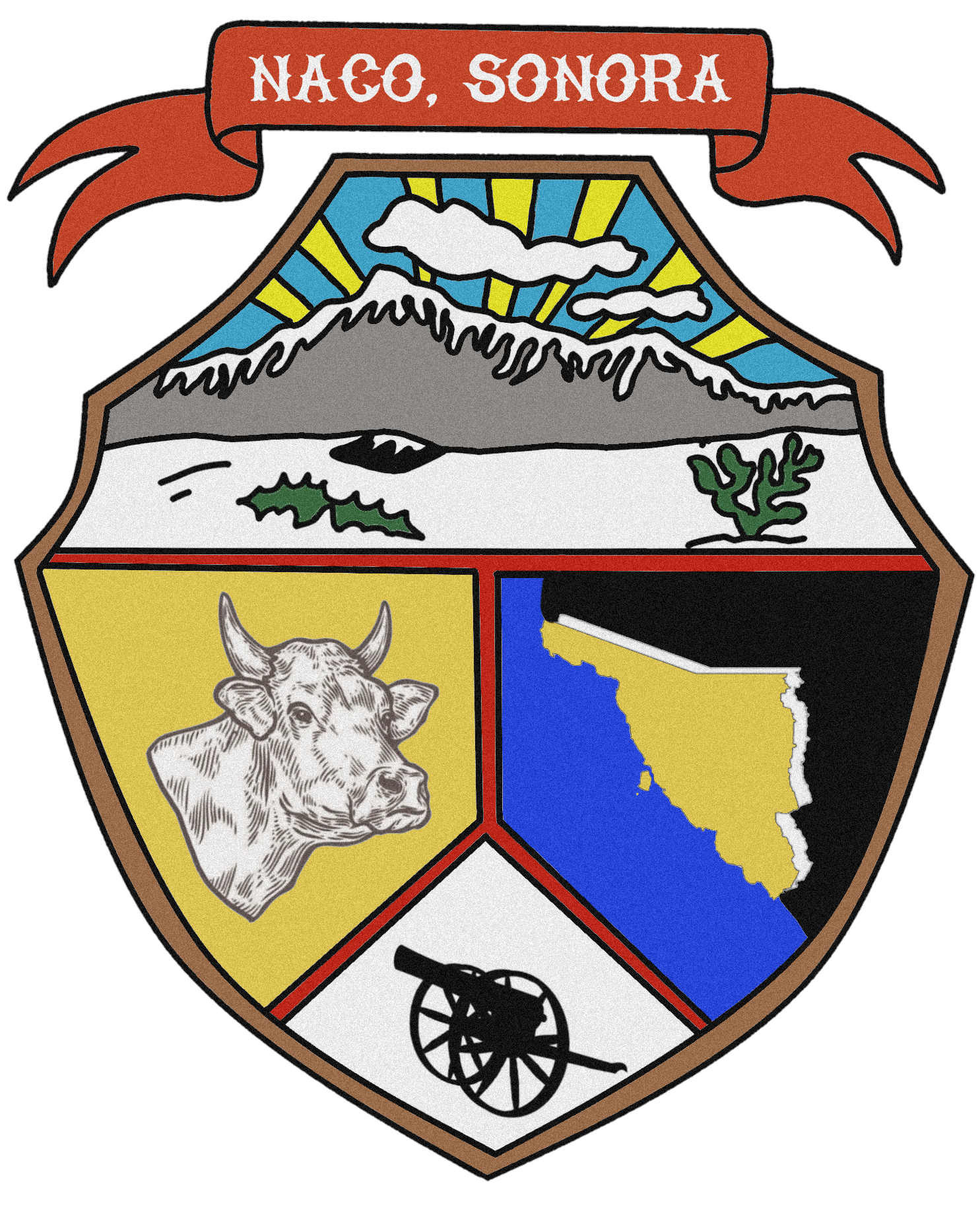 Escudo del municipio sonorense.